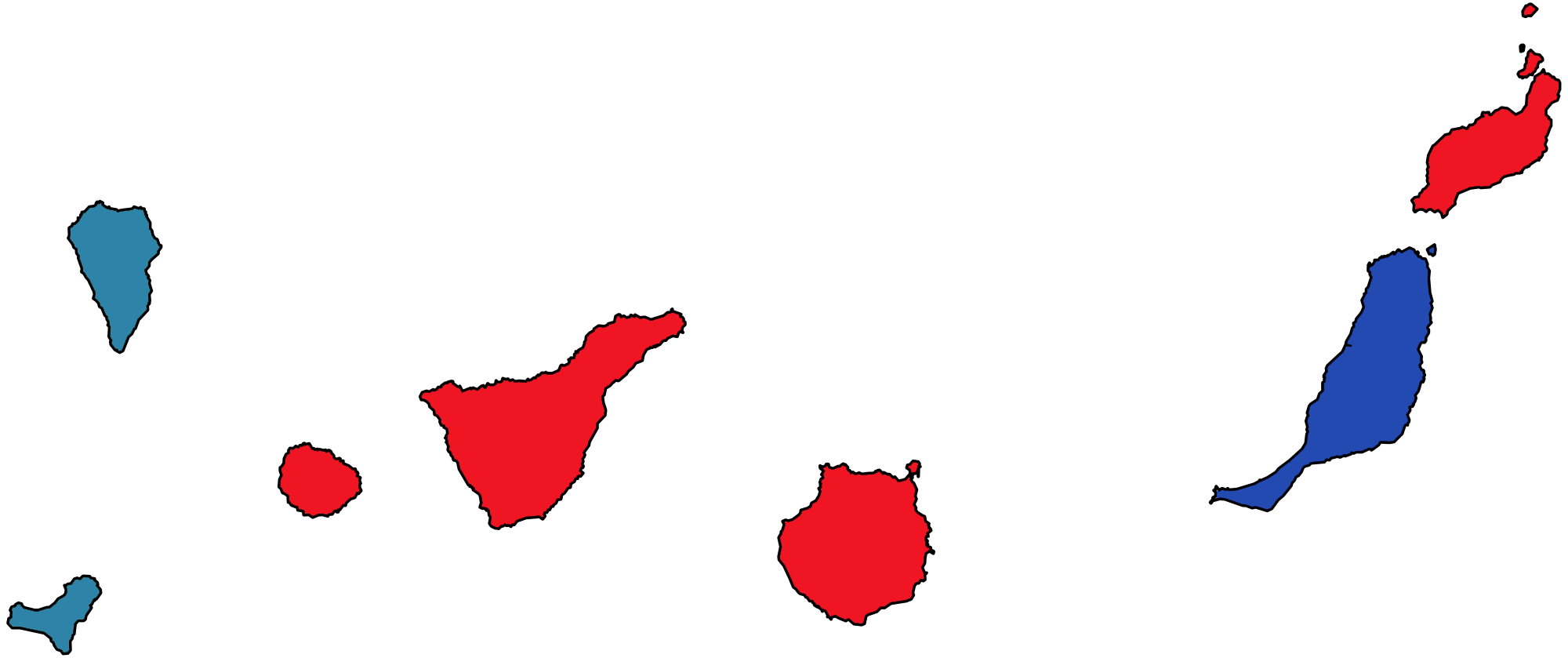 Partido más votado por circunscripción en las elecciones autonómicas de las Islas Canarias de 1983. Partido Socialista Obrero Español (PSOE) / Spanish Socialist Workers' Party Alianza Popular-Partido Demócrata Popular-Unión Liberal (AP-PDP-UL) / People's Alliance-People's Democrat Party-Liberal Union Asamblea Majorera (AM) / Majorera Assembly